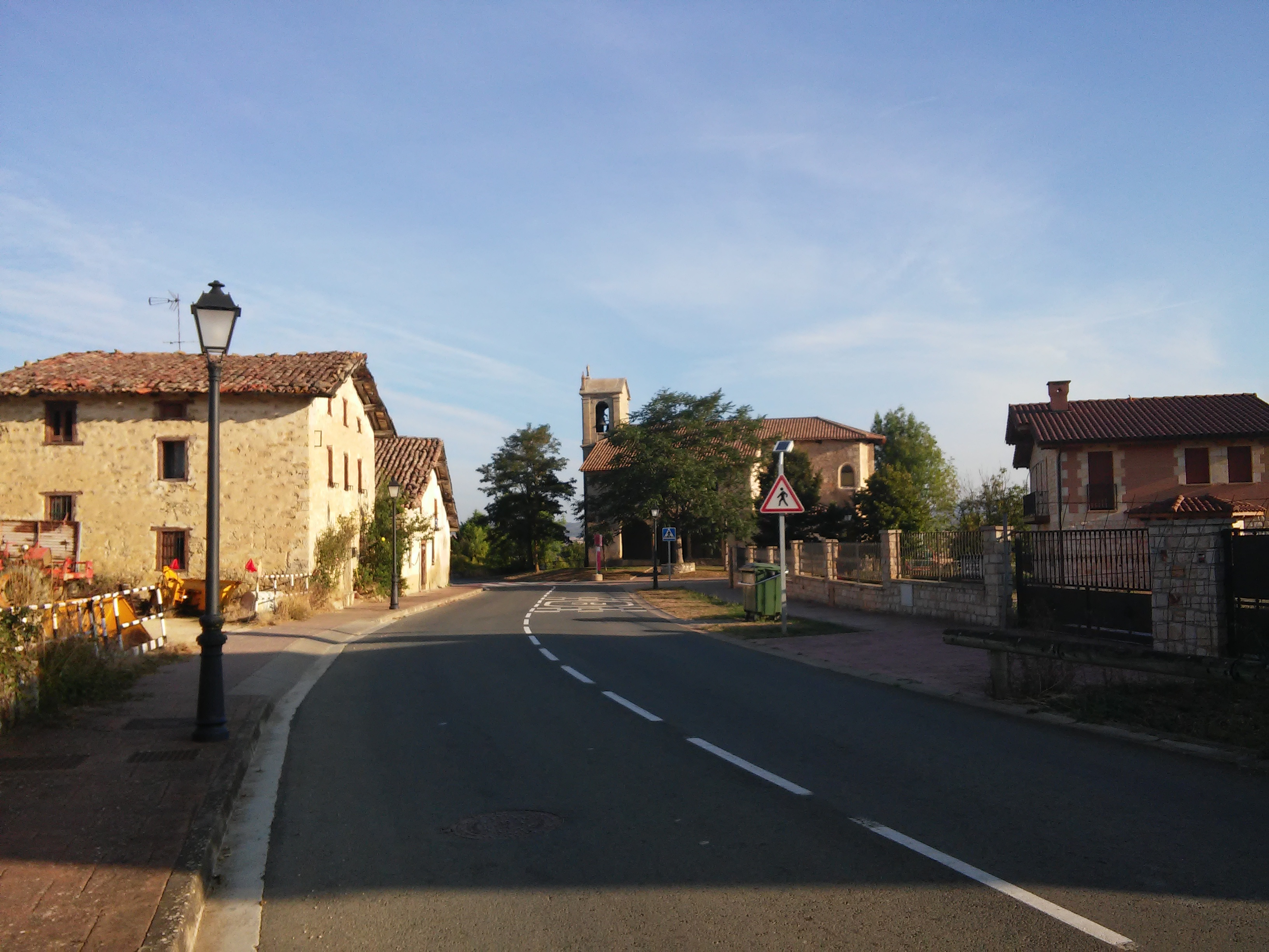 Zerio herria (Gasteiz)